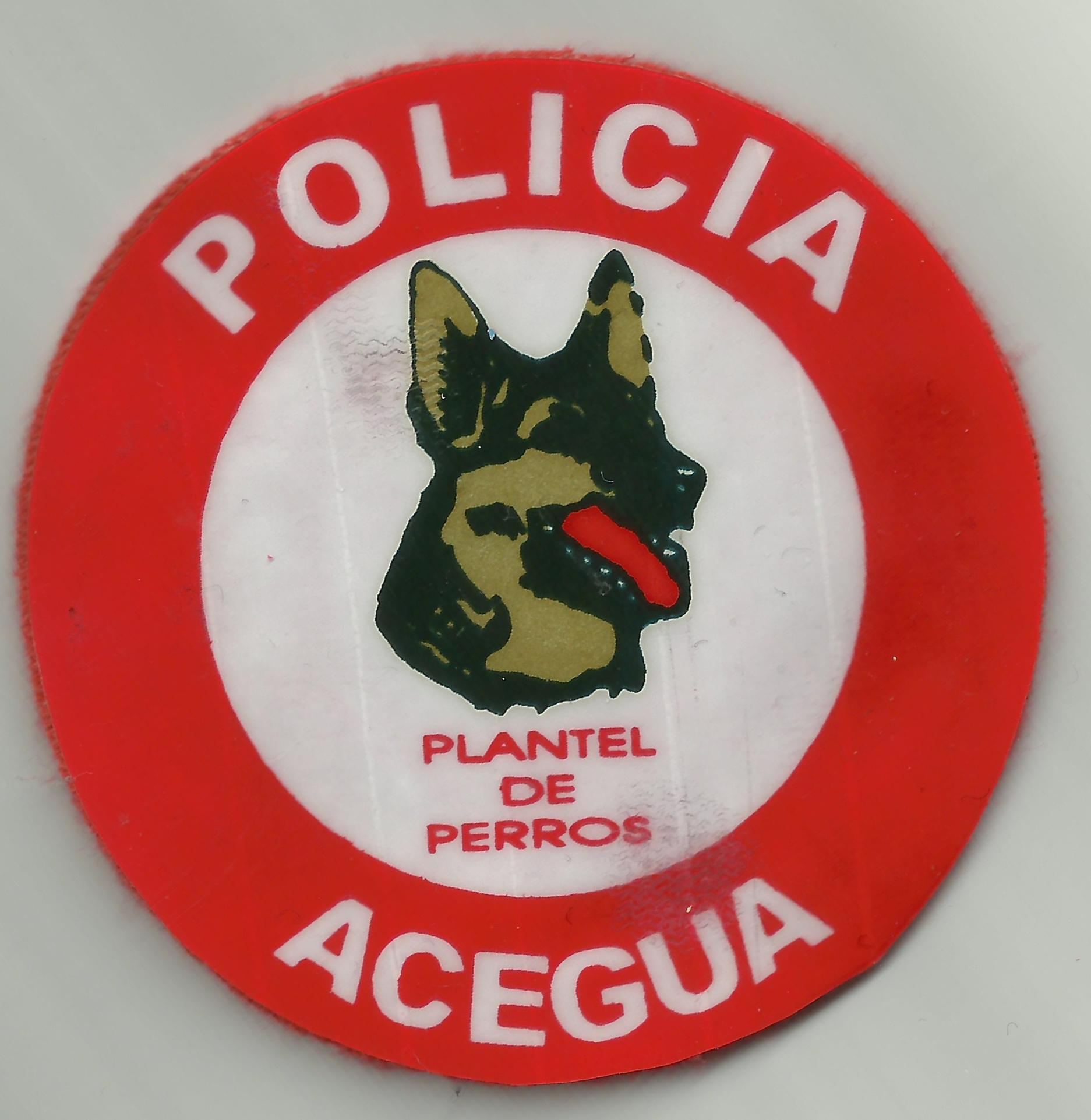 Politie embleem Uruguay